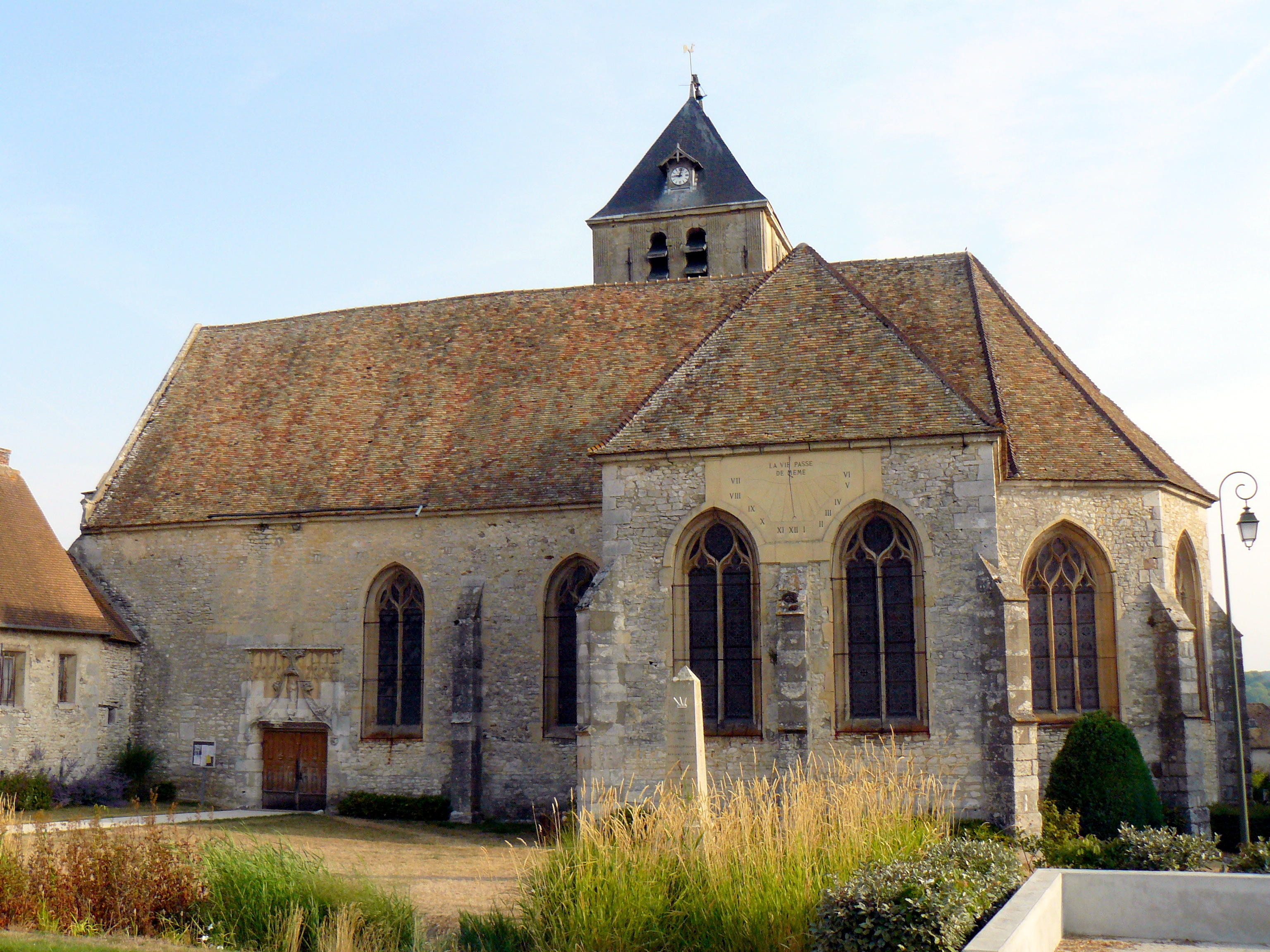 Eglise Saint-Pierre de Guainville (Eure-et-Loir, France)